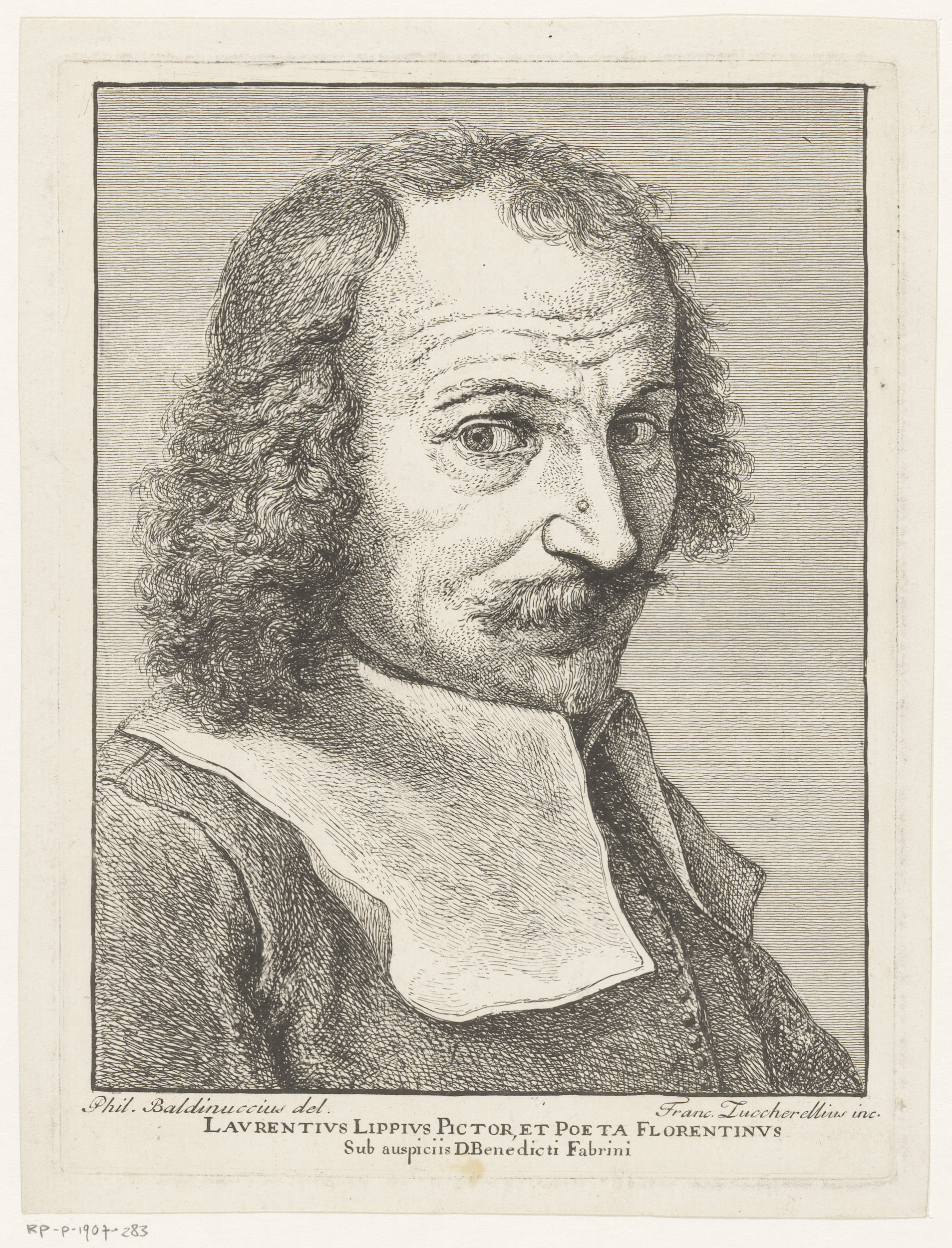 IdentificatieTitel(s): Portret van schilder en dichter Lorenzo LippiObjecttype: prent Objectnummer: RP-P-1907-283Catalogusreferentie: LeBlanc 2Opschriften / Merken: verzamelaarsmerk, verso, gestempeld: Lugt 2228VervaardigingVervaardiger: prentmaker: Francesco Zuccarelli (vermeld op object)naar tekening van: Filippo Baldinucci (vermeld op object)Plaats vervaardiging: ItaliëDatering: 1712 - 1788Fysieke kenmerken: etsMateriaal: papier Techniek: etsenAfmetingen: plaatrand: h 215 mm × b 160 mmOnderwerpWat: writer, poet, authorportrait, self-portrait of artisthistorical personsWie: Lorenzo LippiVerwerving en rechtenVerwerving: aankoop 1905Copyright: Publiek domein